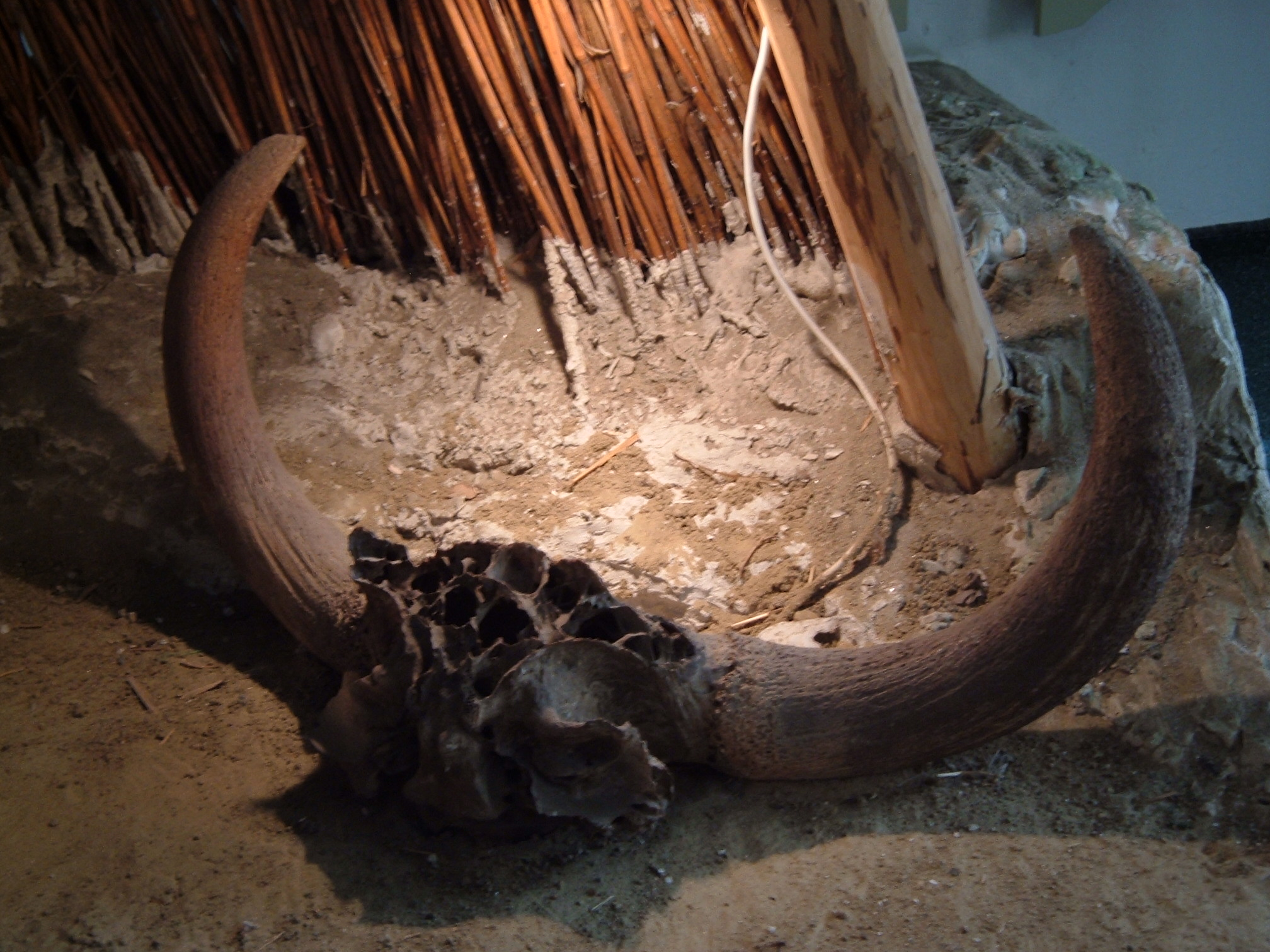 Paleolitikumi bölénykoponya a Damjanich János Múzeum gyűjteményéből (Szolnok)